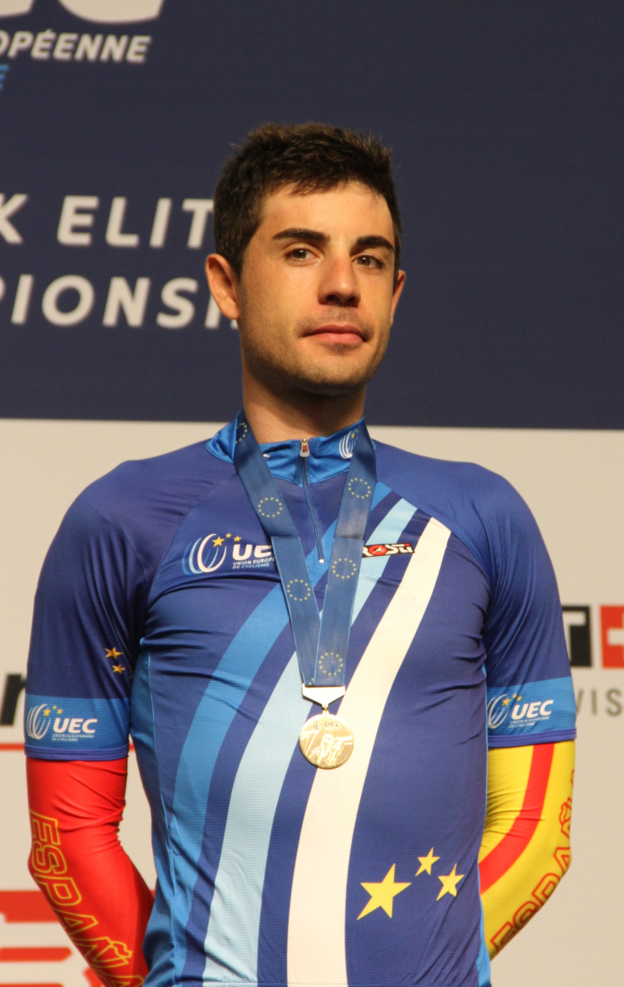 Sebastián Mora, spanischer Radsportler The making of this document was supported by the Community-Budget of Wikimedia Germany.